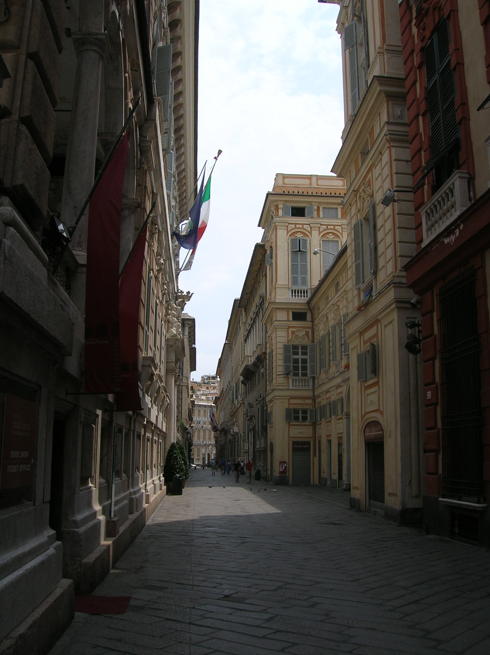 Palazzi in der Via Garibaldi.